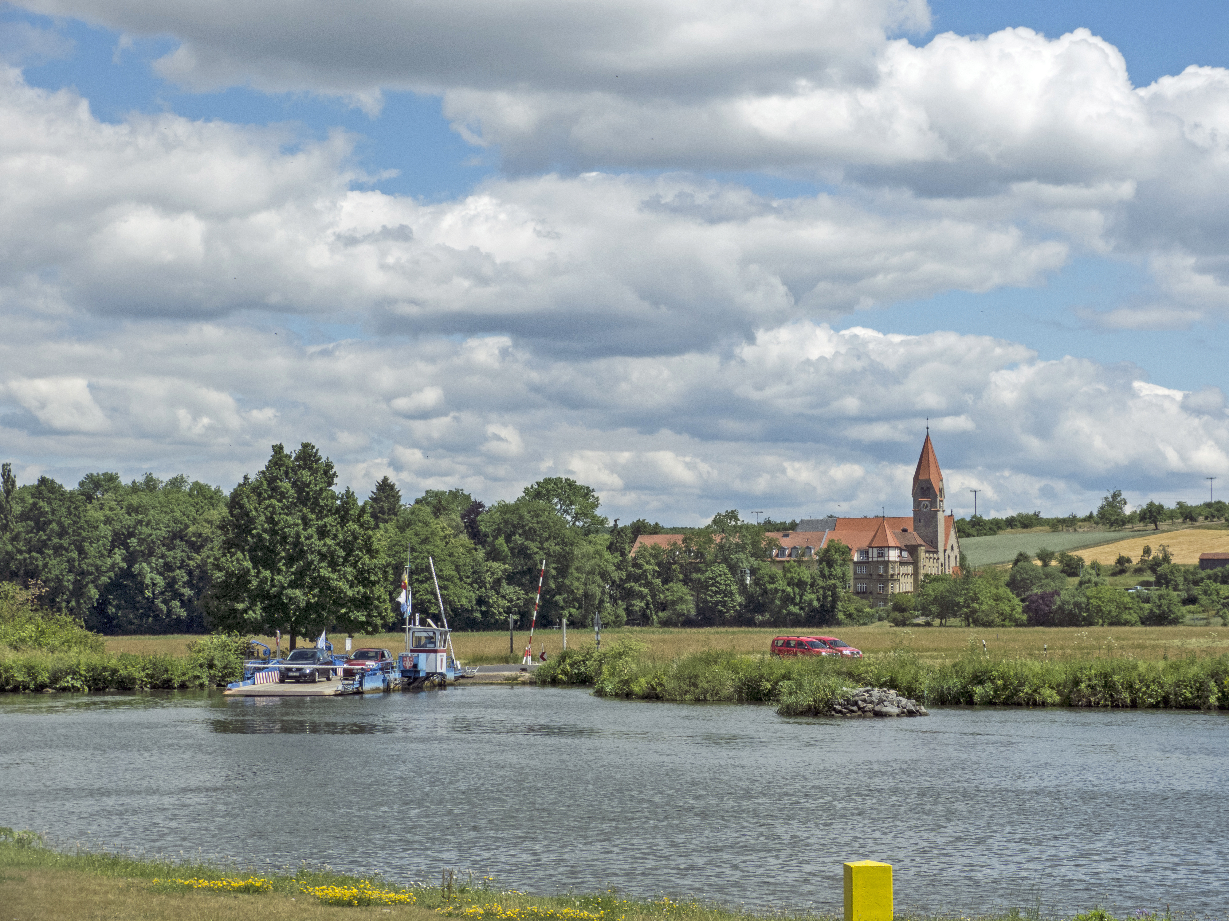 Naturschutzgebiet "Wipfelder Mainaue bei St. Ludwig" Die Auenlandschaft präsentiert sich als zusammenhängender langgezogener Landschaftsteil aus Wiesen von unterschiedlichem Nutzungsgrad, in die mosaikhaft Auewaldreste mit Säumen, Gebüschkomplexe, Hecken, Einzelbäume, Hochstauden- sowie Röhrichtbestände, Buhnen und am Ostrand das Fließgewässer Altach eingebettet liegen.